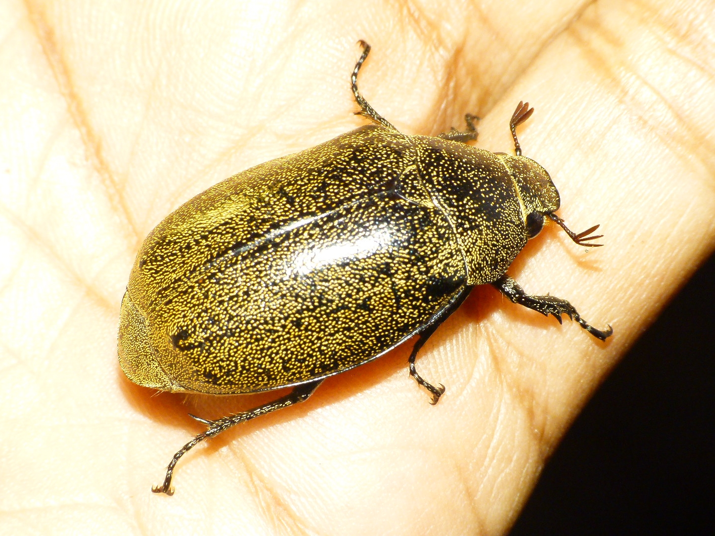 Leucopholis lepidophora, Scarabaeidae, Coleoptera. Jamboti, Uttara Kanara, Karnataka.